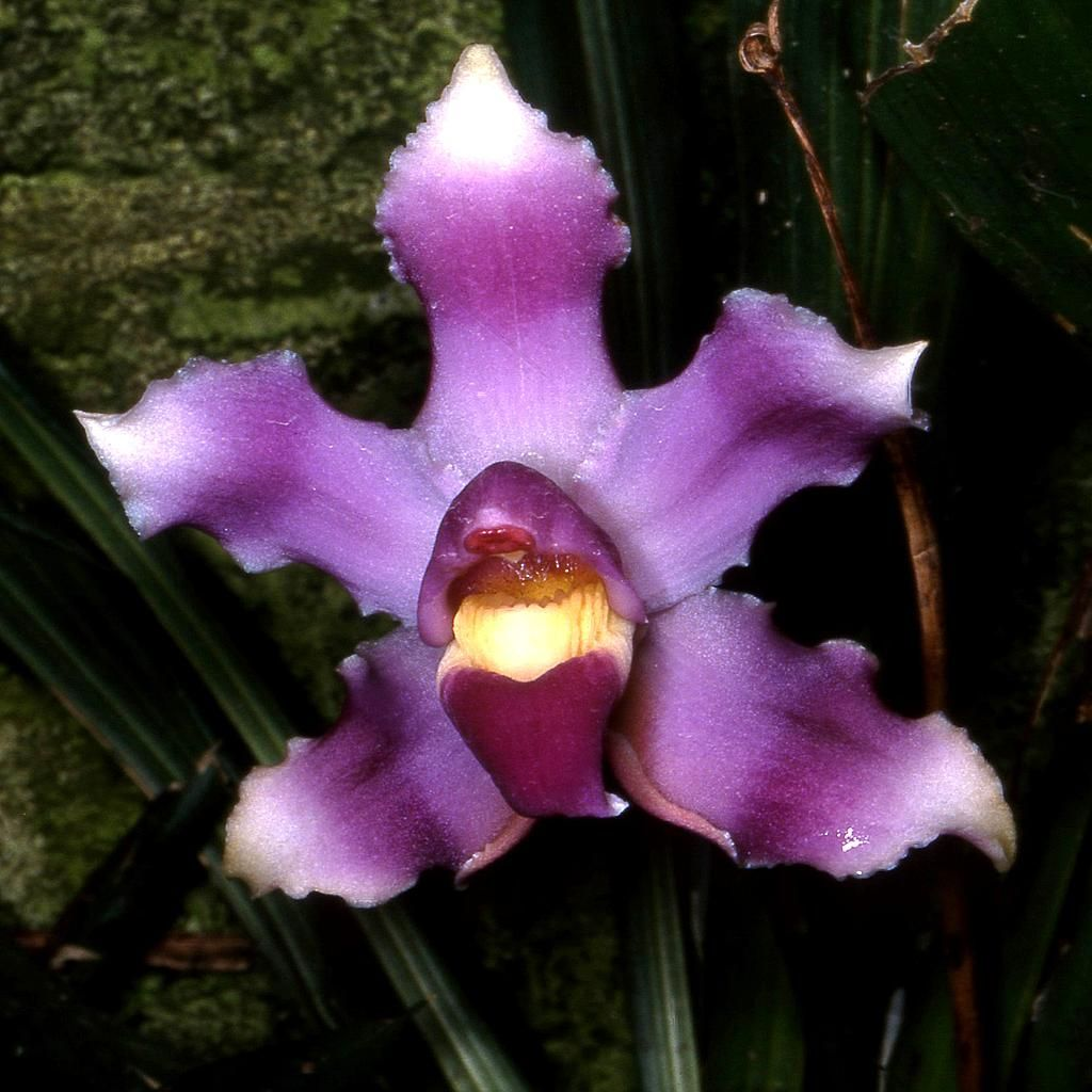 Pescatoria ecuadorana